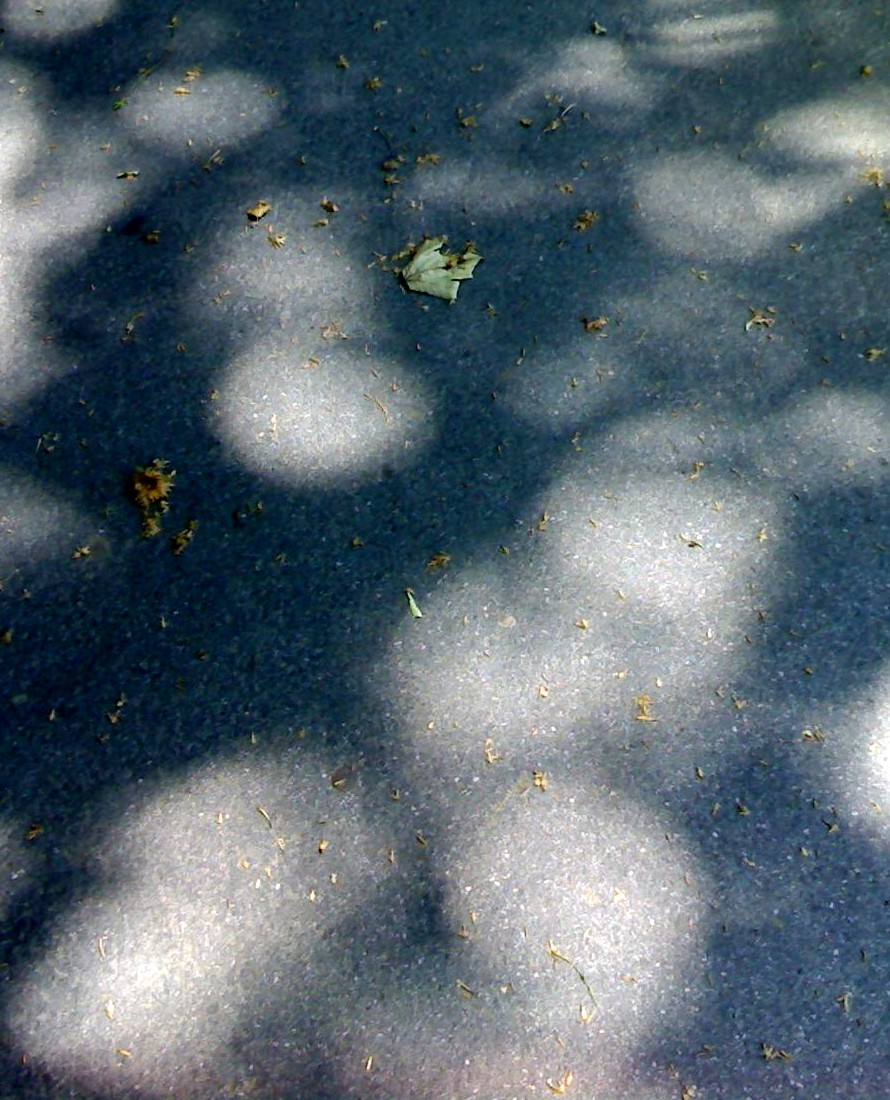 Sonnentaler